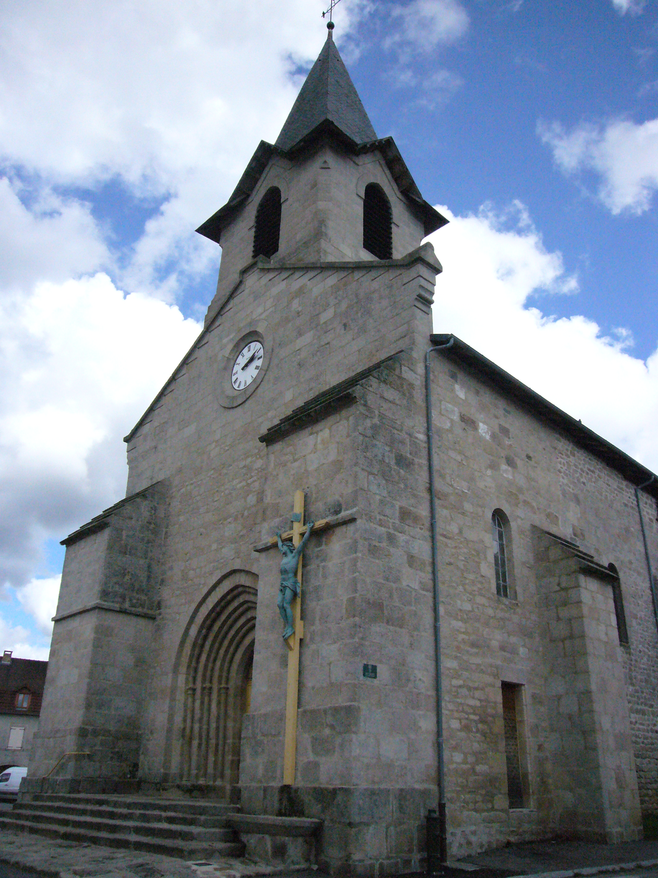 L'église de La Jonchère-Saint-Maurice, Haute-Vienne, France